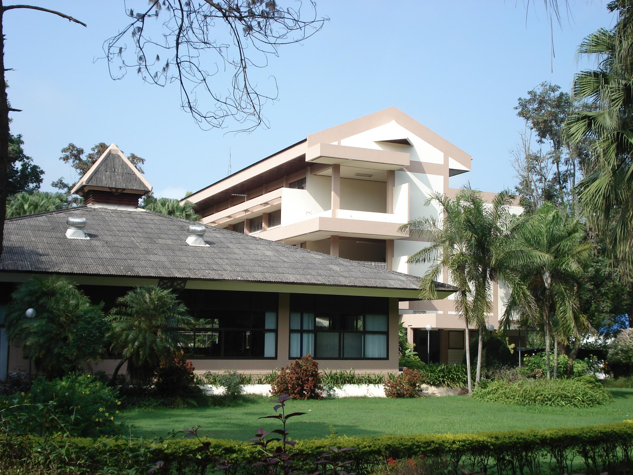 สถาบันวิจัยและเทคโนโลยีการเกษตร